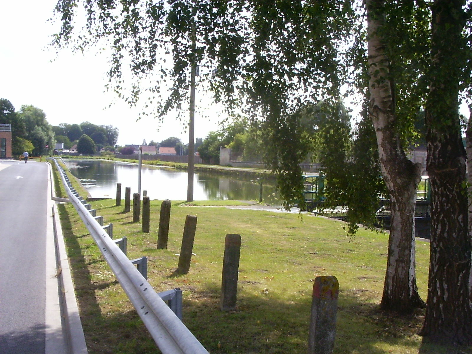 Ham, Sommekanaal bij de sluis